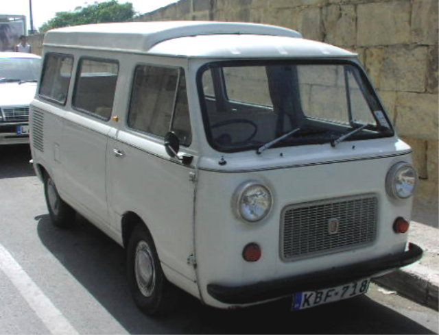 Fiat 850 T Bus in Malta